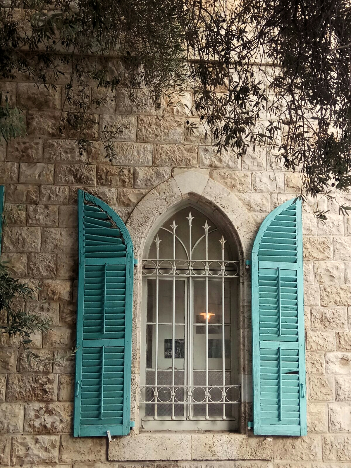 חלון בית דיק